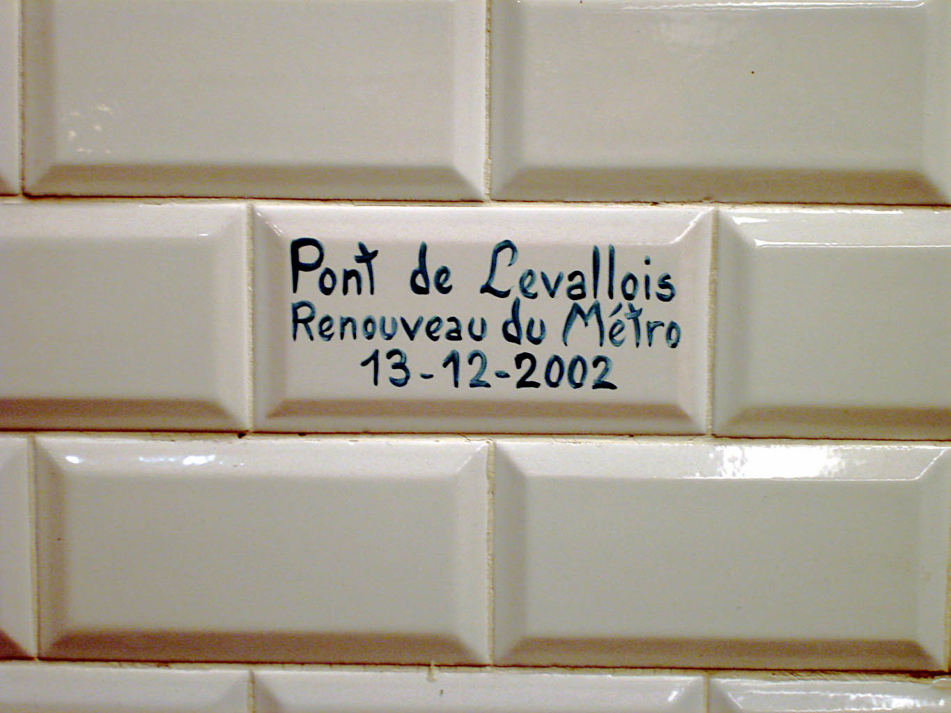 Carreau marquant l'opération Renouveau du Métro, à la station Pont de Levallois - Bécon, ligne 3 du métro de Paris, France.